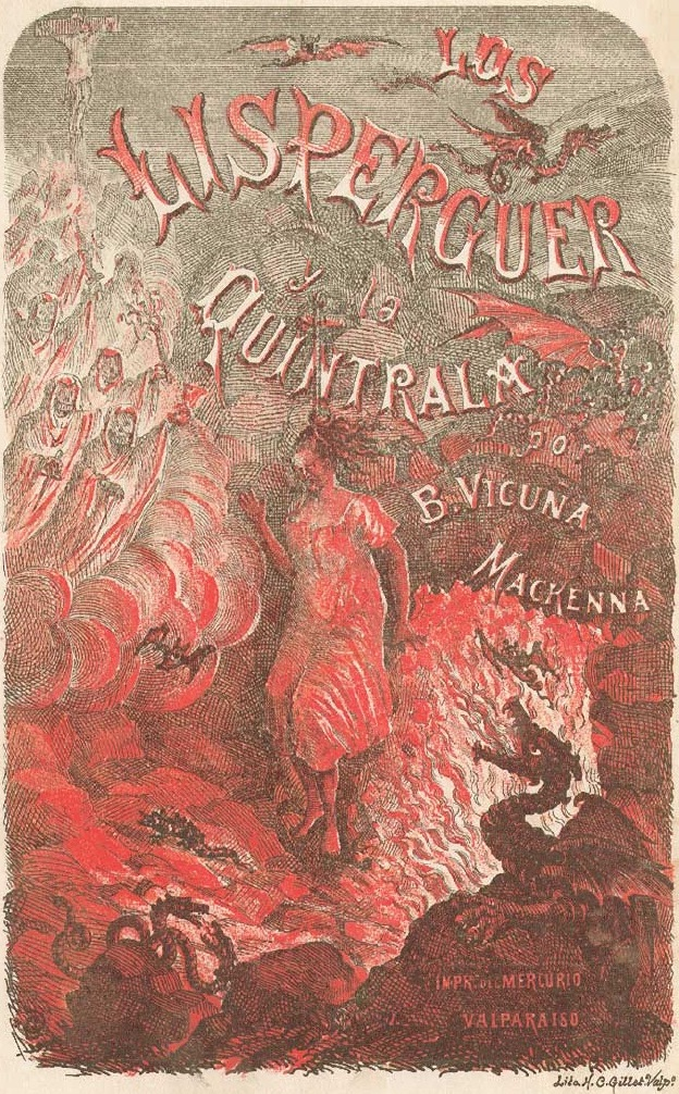 Los Lisperguer y la Quintrala : (Doña Catalina de los Ríos) : episodio histórico-social con numerosos documentos inéditos